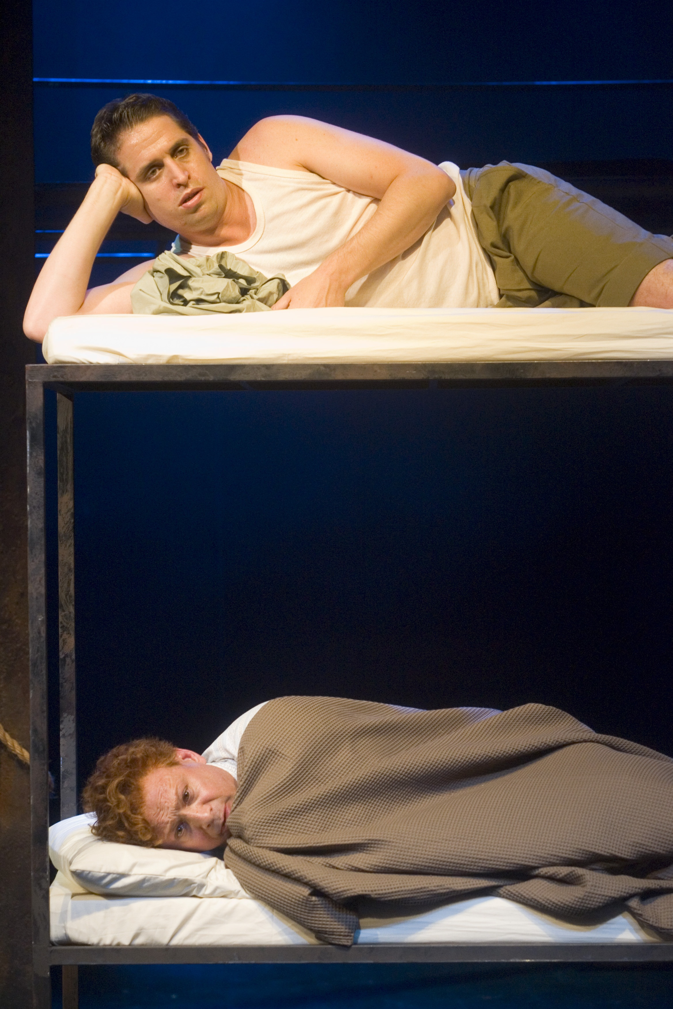 ההצגה "משחיז הסכינים הסיני", בבימויה של מור פרנק, תיאטרון החאן